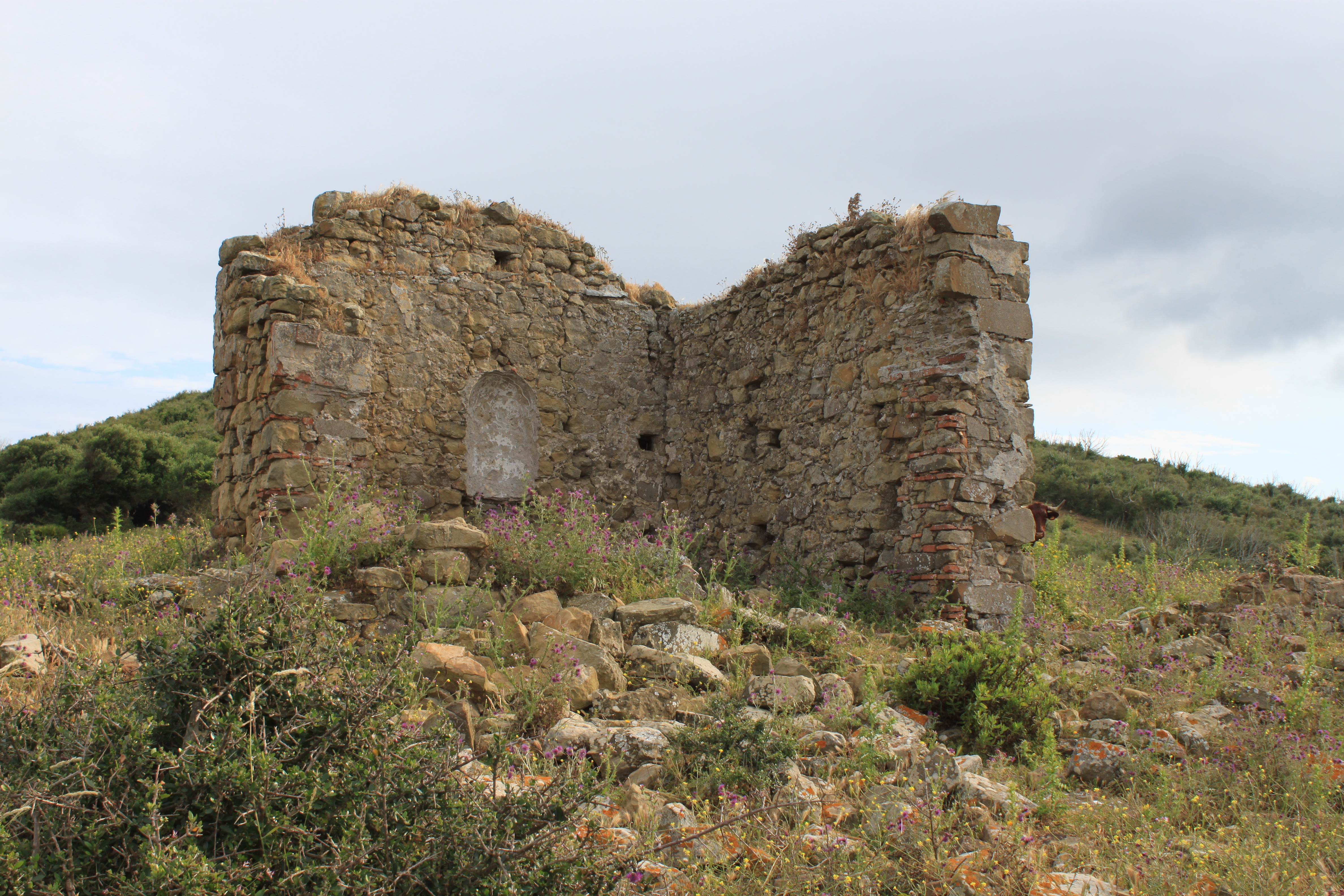 Restos de la Capilla de la Dehesa de la Punta en la zona denominada Viña Grande, en los alrededores de Punta Carnero. Esta capilla fue contruida en 1777 sobre los cimientos de una torre almenara para atender las demandas religiosas de los colonos afincados en la región. Esta capilla fue desamortizada y vendida en la década de 1820 para posteriormente ser utilizada como caballeriza. En la actualidad se conservan dos lienzos de la nave central y se han perdido las dos naves laterales.